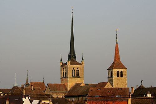 Payerne: Die Kirchtürme der Abteikirche und der evang. Kirche